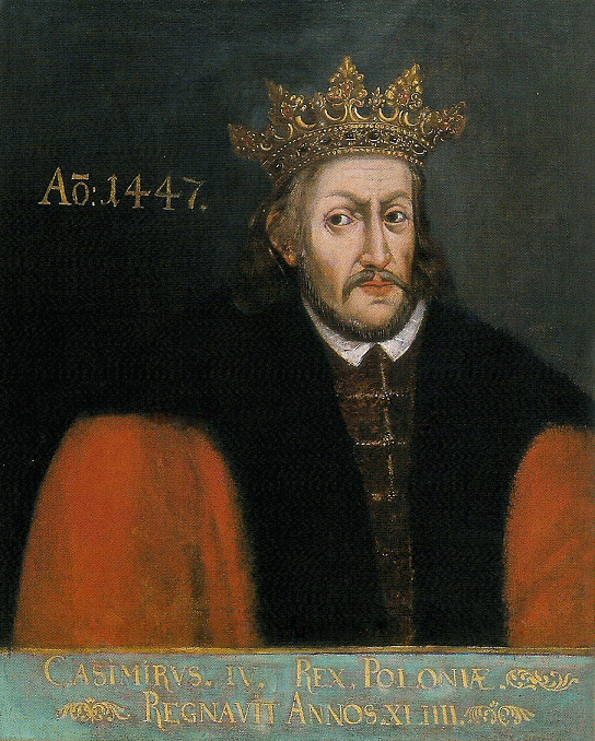 Беларуская (тарашкевіца): Партрэт вялікага князя Казімера Ягайлавіча (Kazimier Jagajłavič)